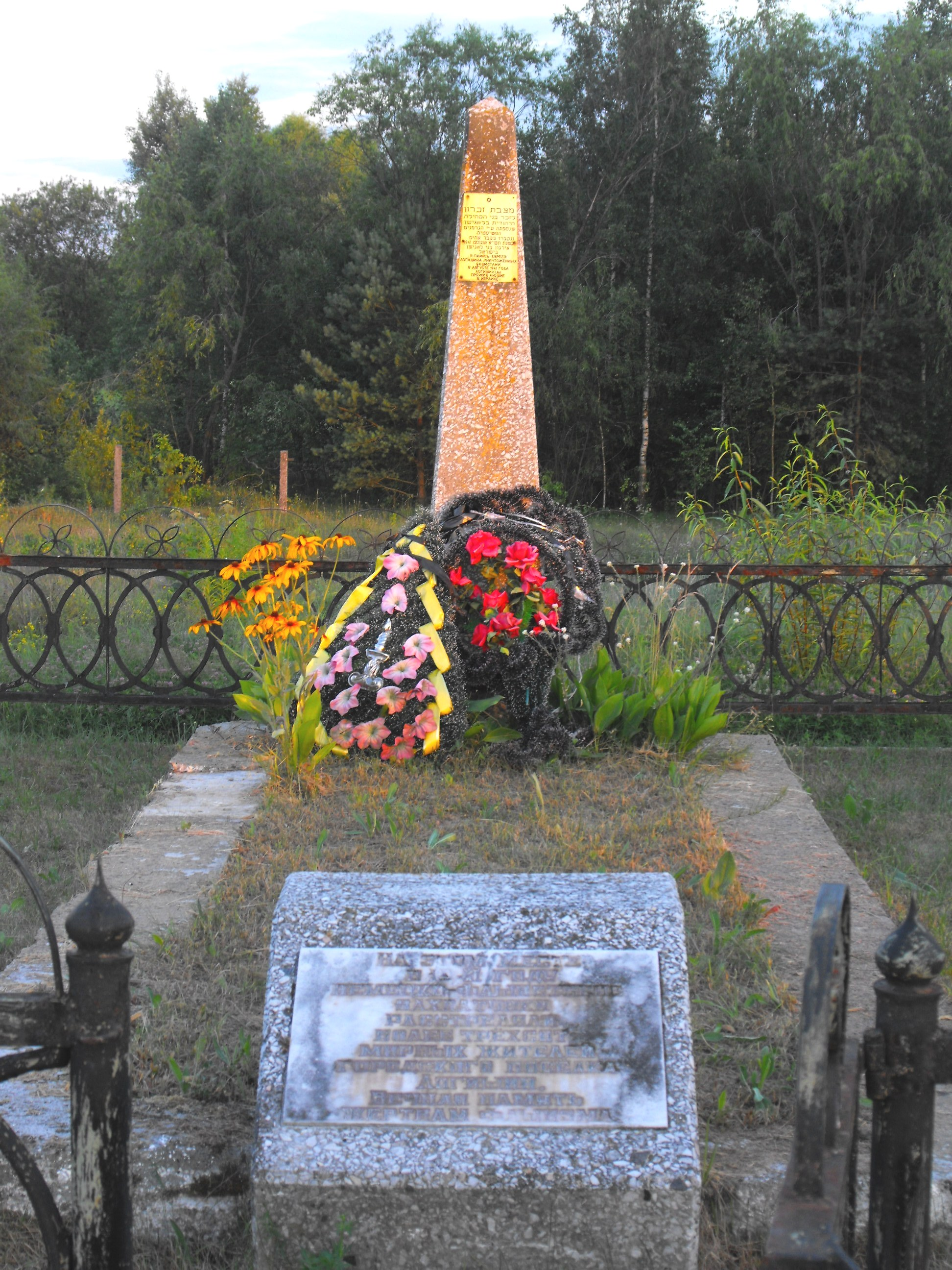 Памятник на окраине города Логишин Брестской области на месте убийства нацистами и полицаями евреев Логишина во времена Холокоста.